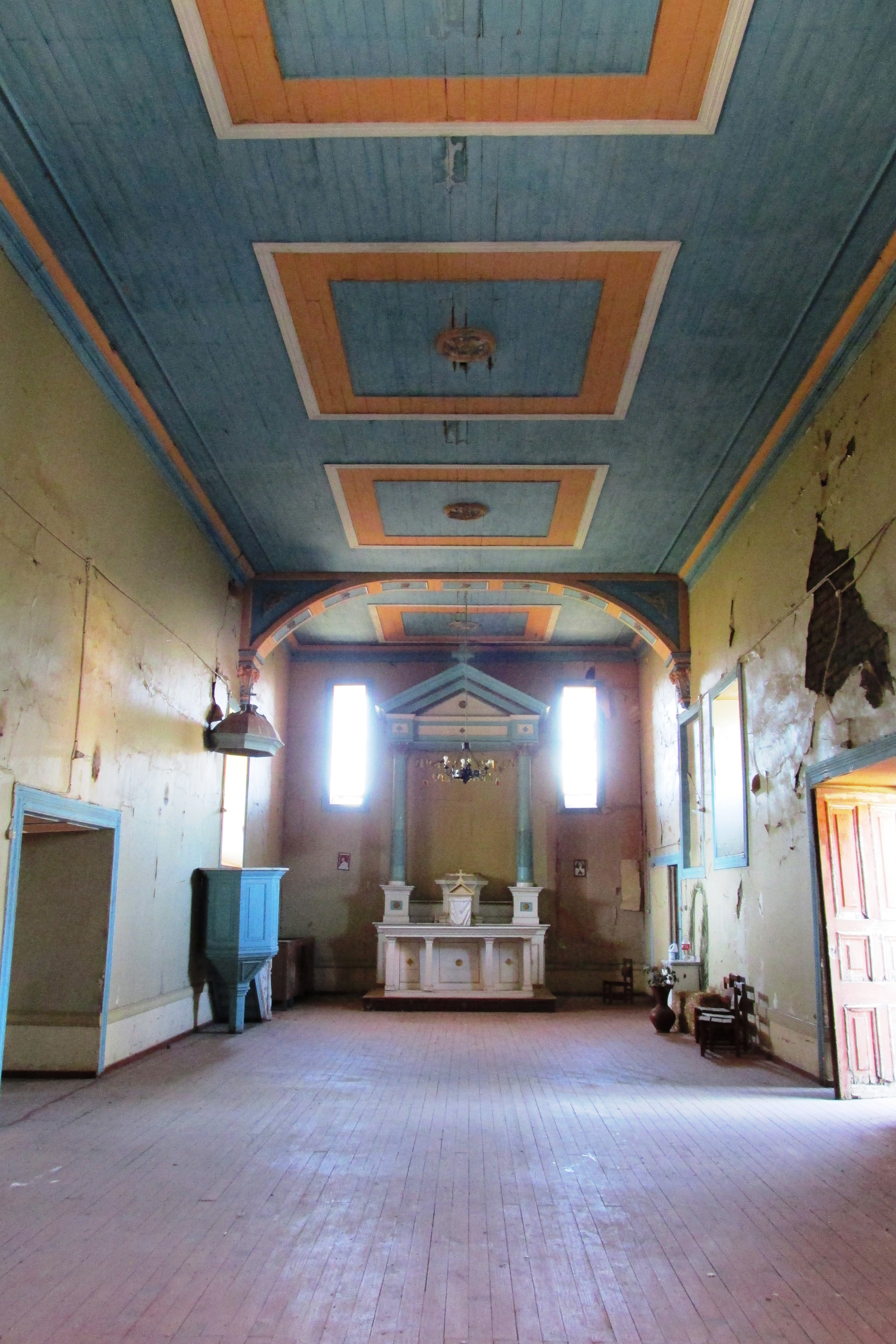 Interior Iglesia de Loica comuna de San Pedro Región Metropolitana